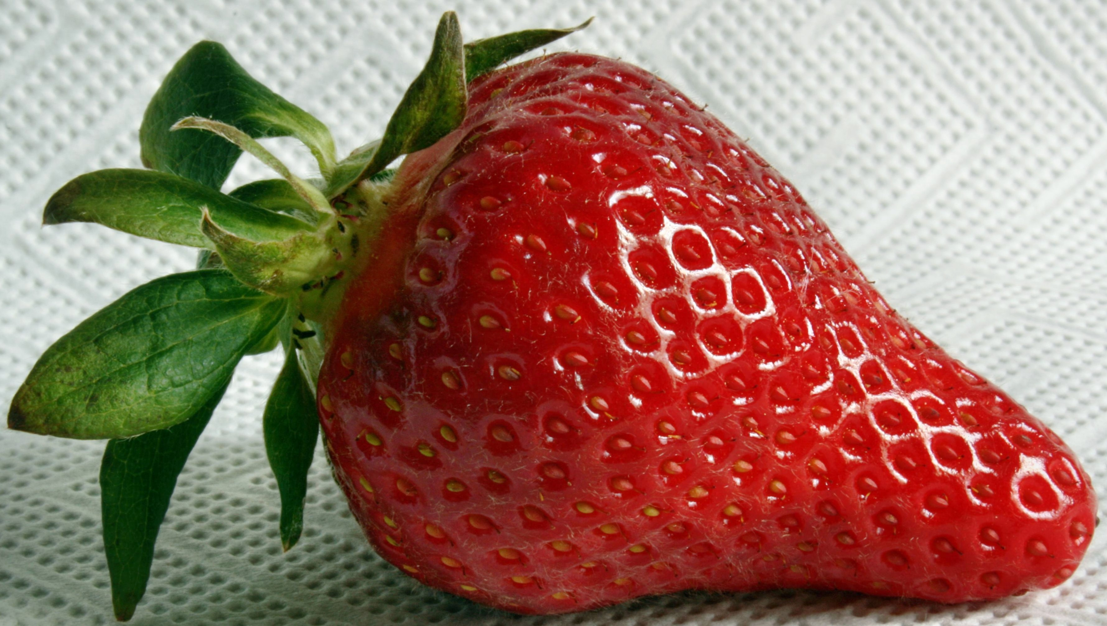 Erdbeere Griechenland Supermarkt